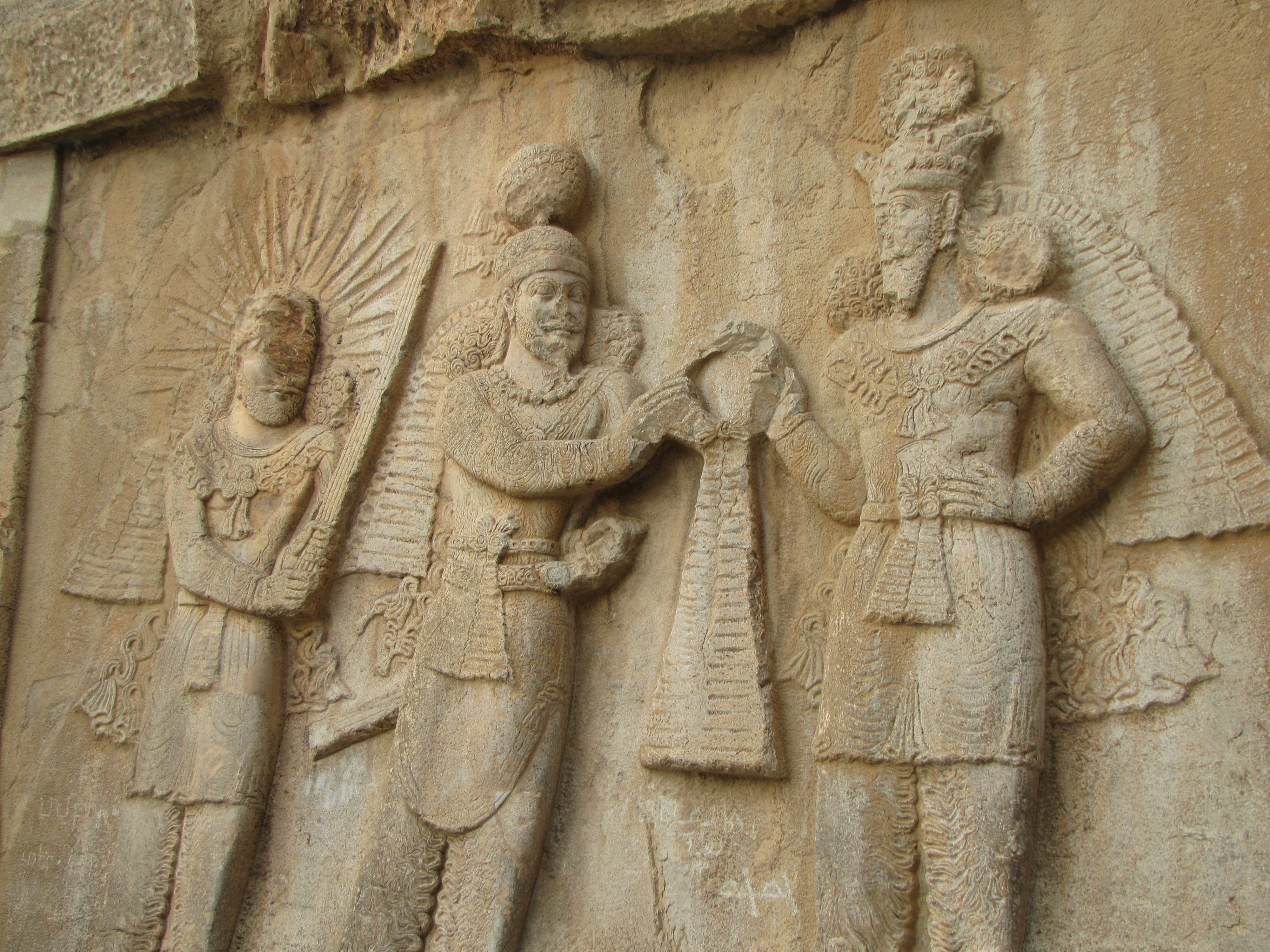 اردشیر دوم در وسط و در سمت چپ یکی از خدایان پارسی و در سمت راست کایتوس و در زیر پای شاه هفتانبخت امپراتور یونان